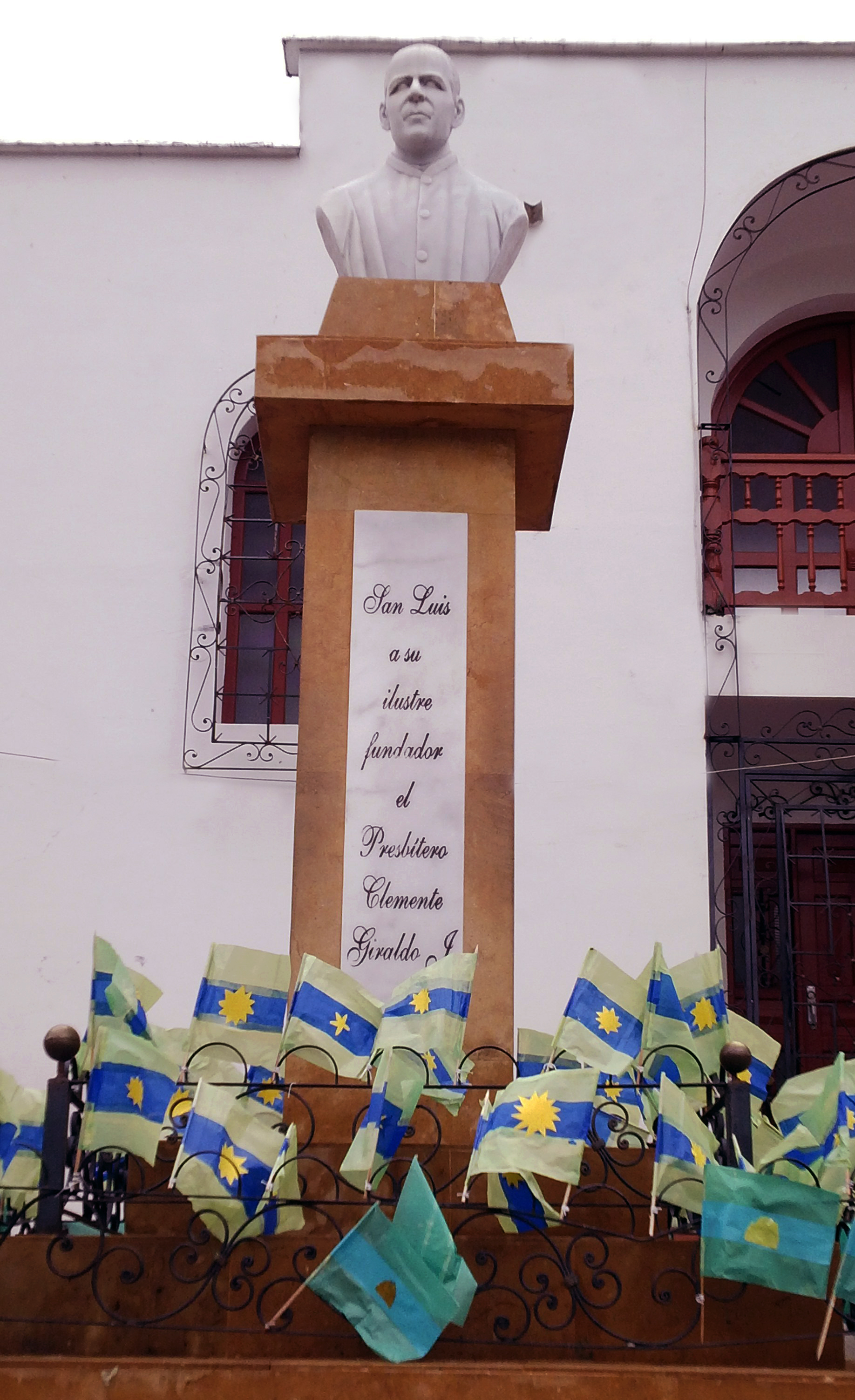 Busto del padre Clemente Giraldo Fundador de San Luis que se encuentra en el atrio del parque del municipio